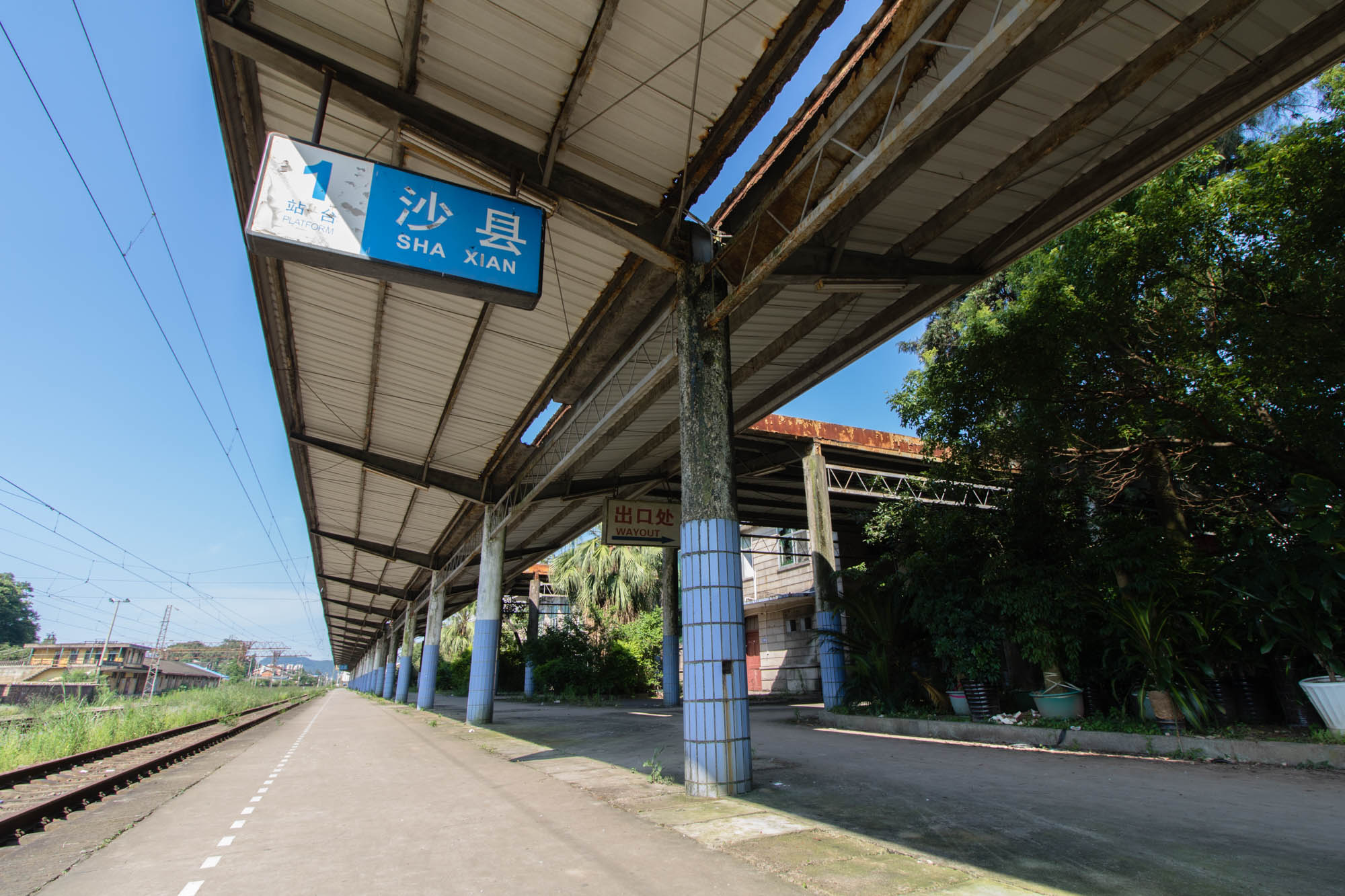 中文（中国大陆）: 废弃的沙县站1号站台